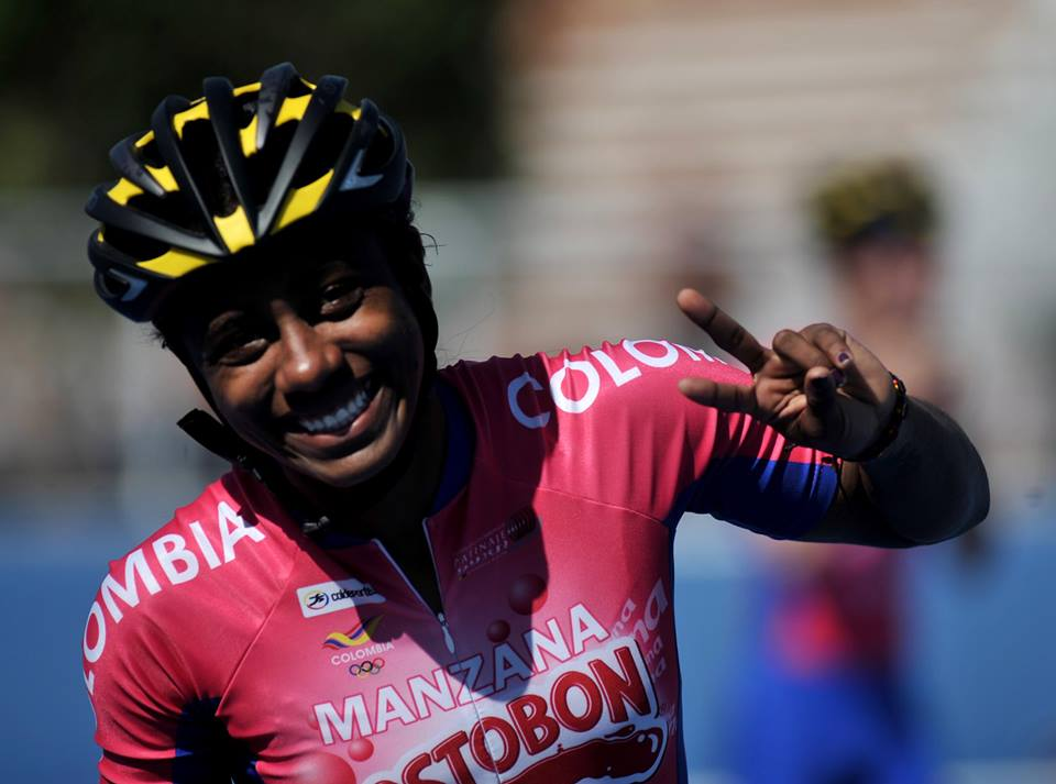 Selección Colombia Manzana Postobon